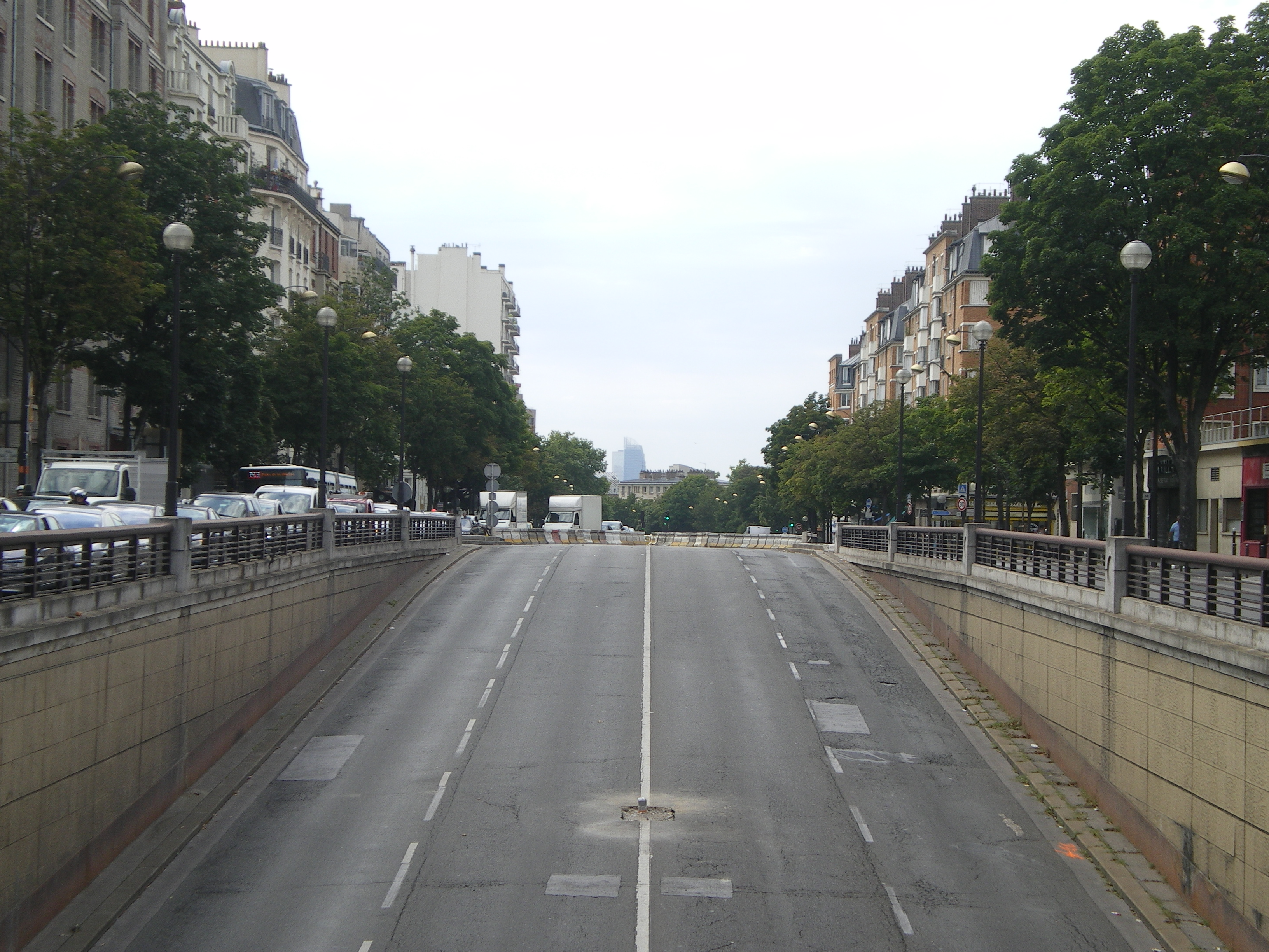 Le boulevard Bessières à la porte de Saint-Ouen